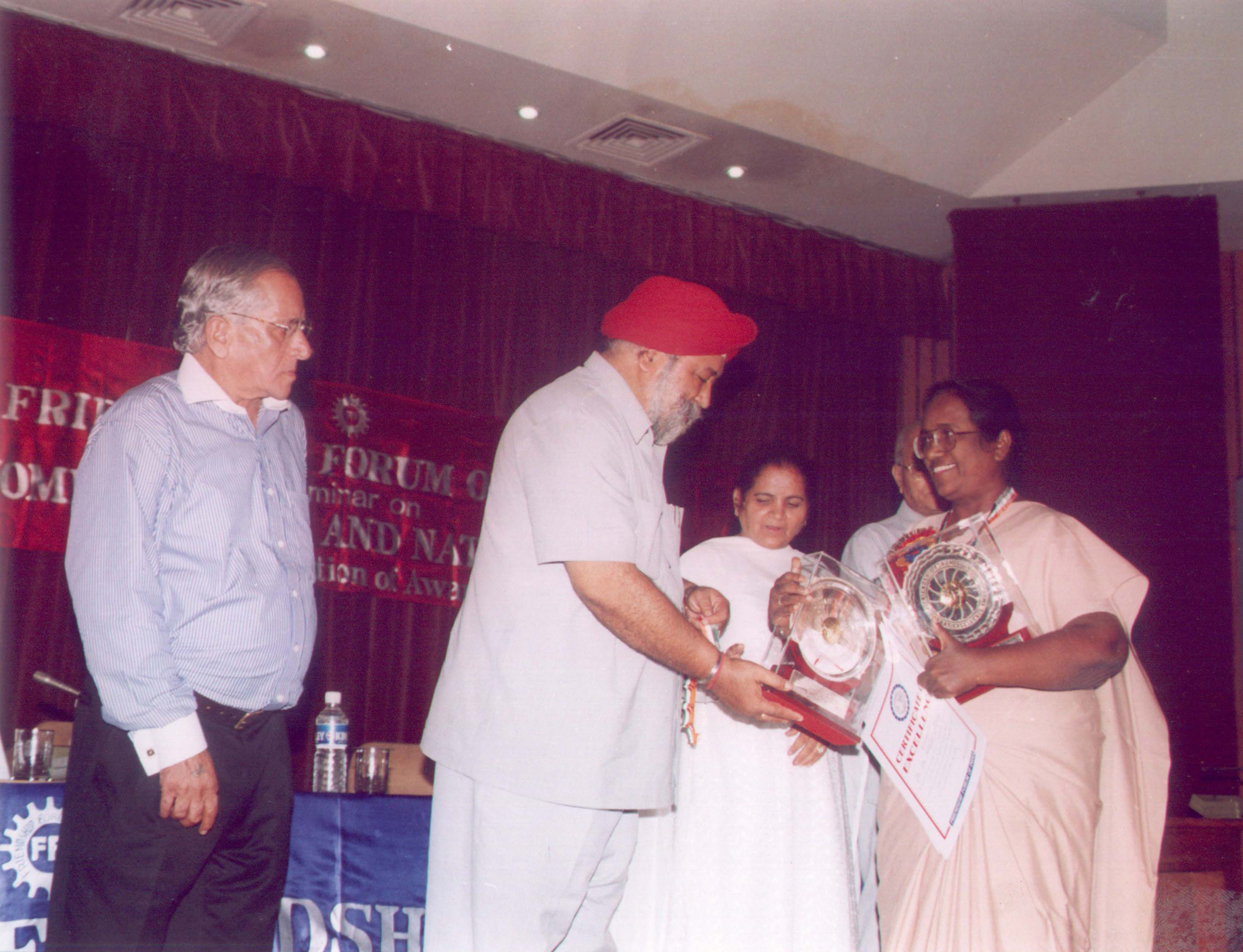 Template:2003 - பாரத் சாதனையாளா் விருது